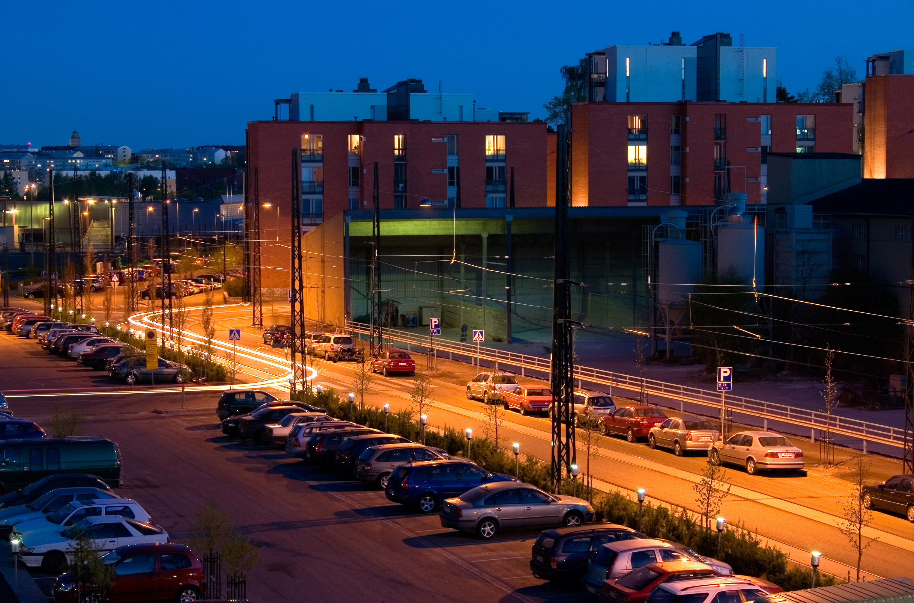 Arabianranta at night